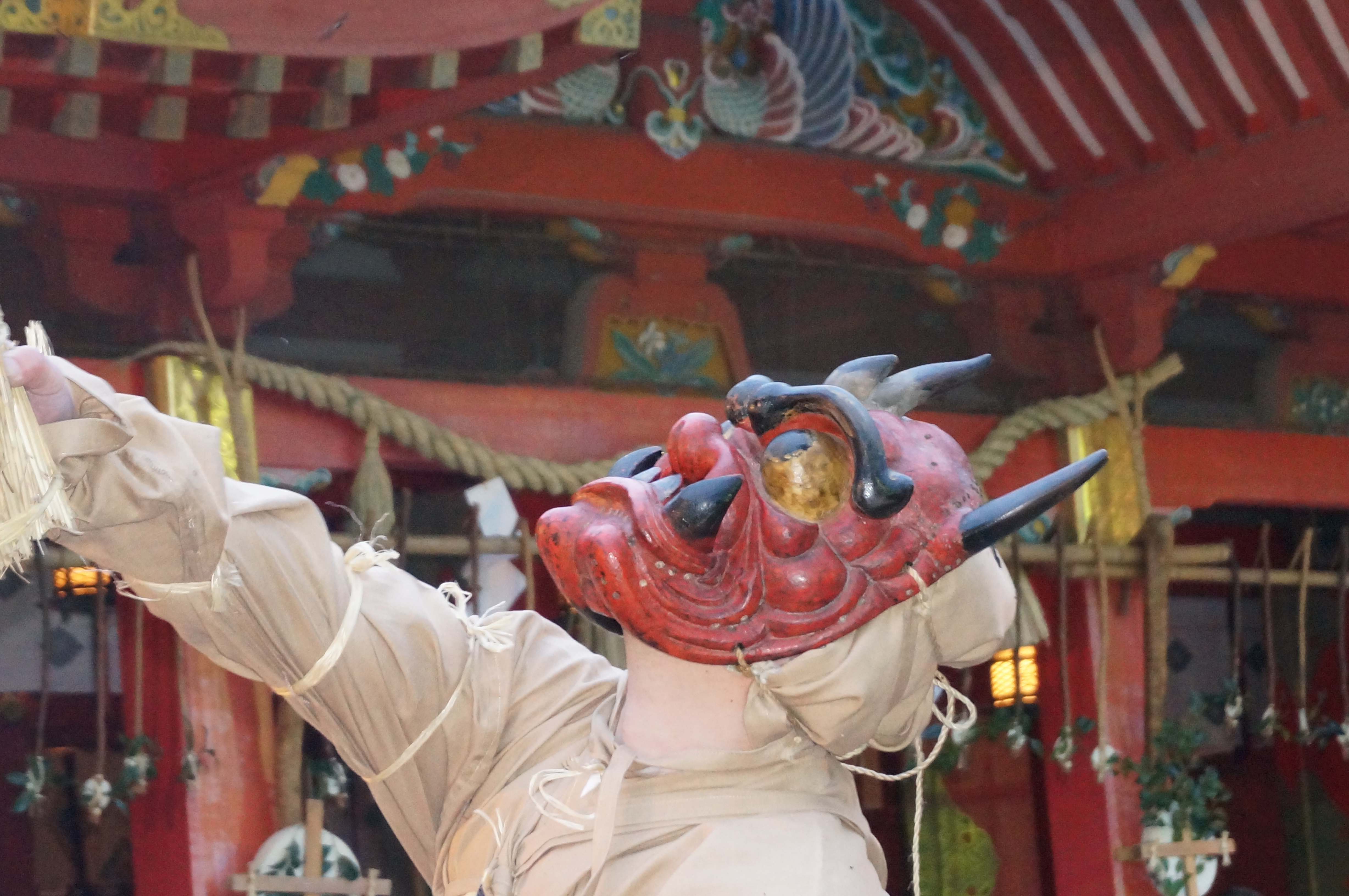 Mochi wari oni (le démon briseur de mochi)